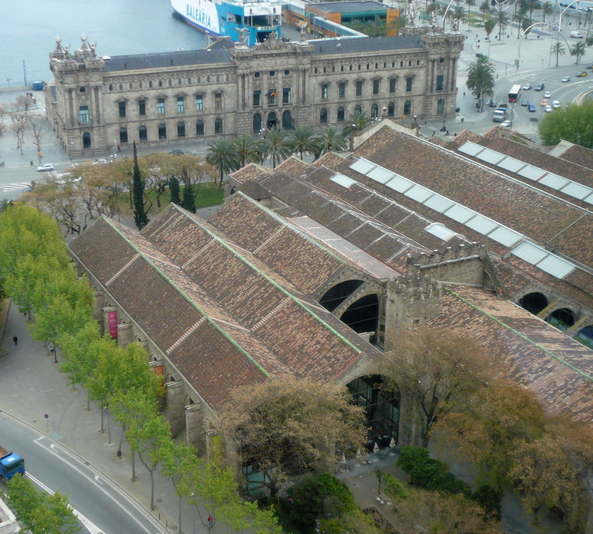 Drassanes reials de Barcelona des del gratacels de l'avinguda de les Drasanes. Al fons, l'edifici de la duana i el port.